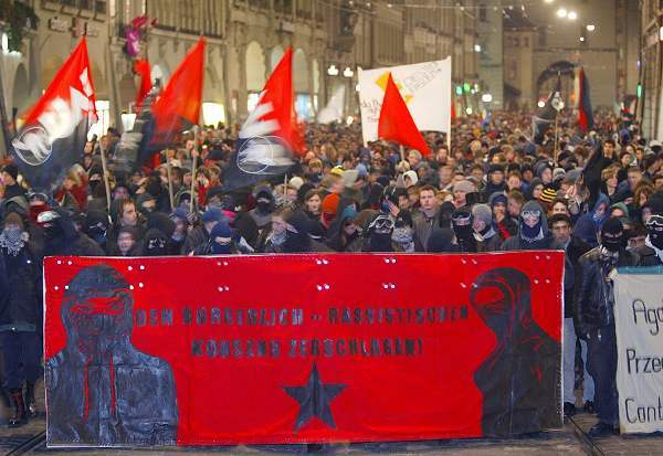 Antifa Demo - 6th August 2006, Bern, Switzerland.